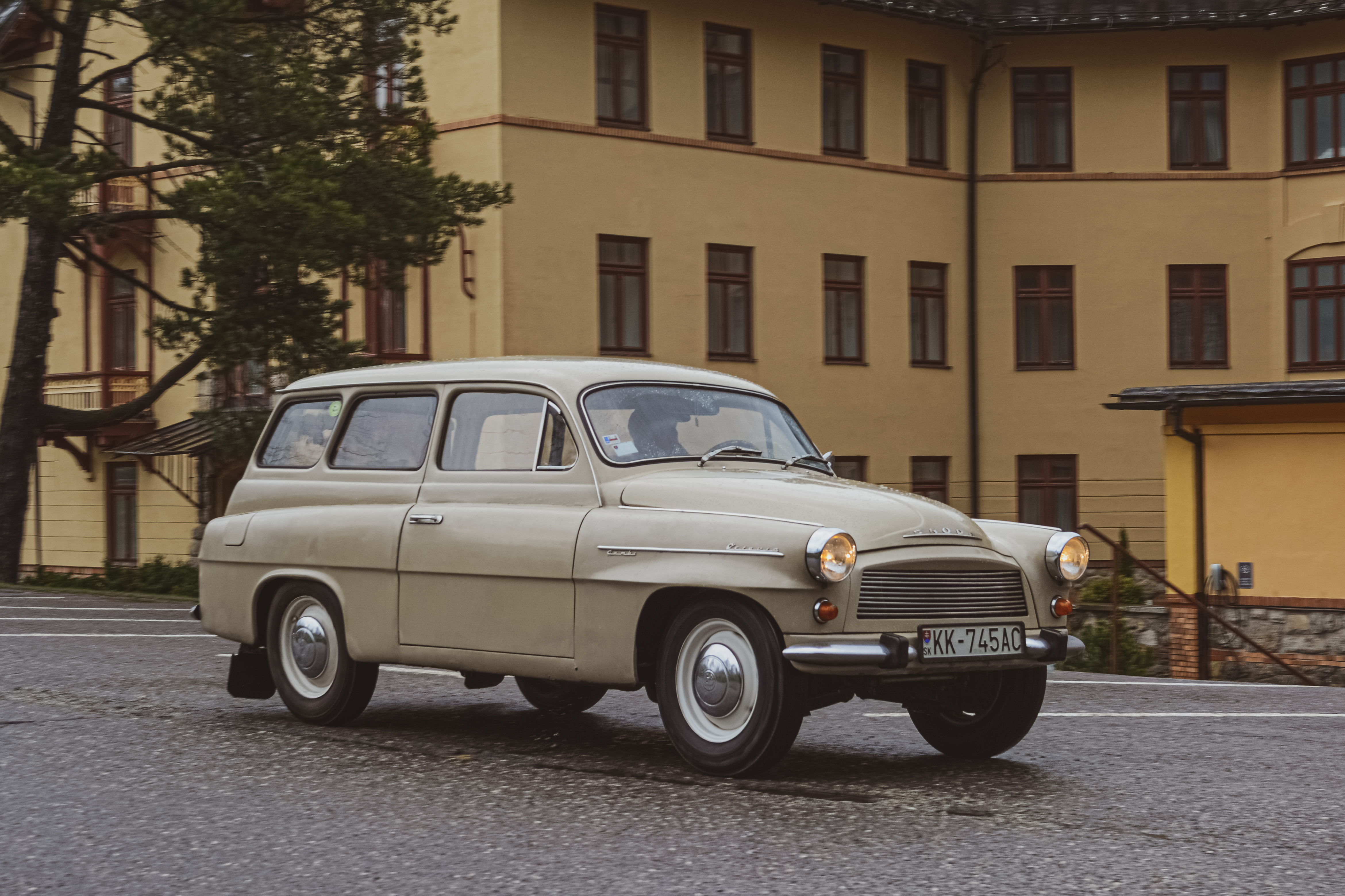 Škoda Octavia Combi (Typ 704) z roku 1969 počas spanilej prvomájovej jazdy pri hoteli Grandhotel Starý Smokovec.